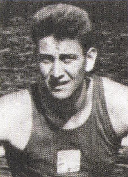 Jan Jindra